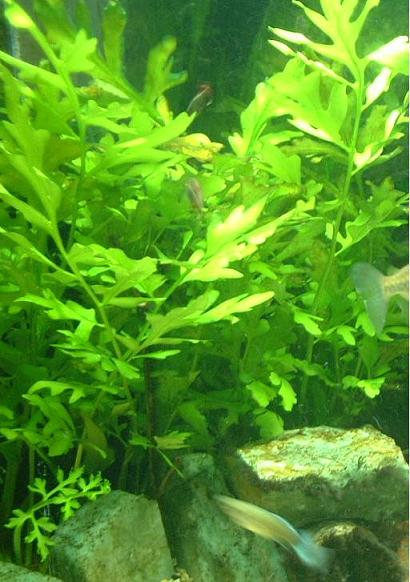 水草